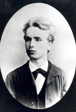 Michael Wittlichi rindportree ovaalis)